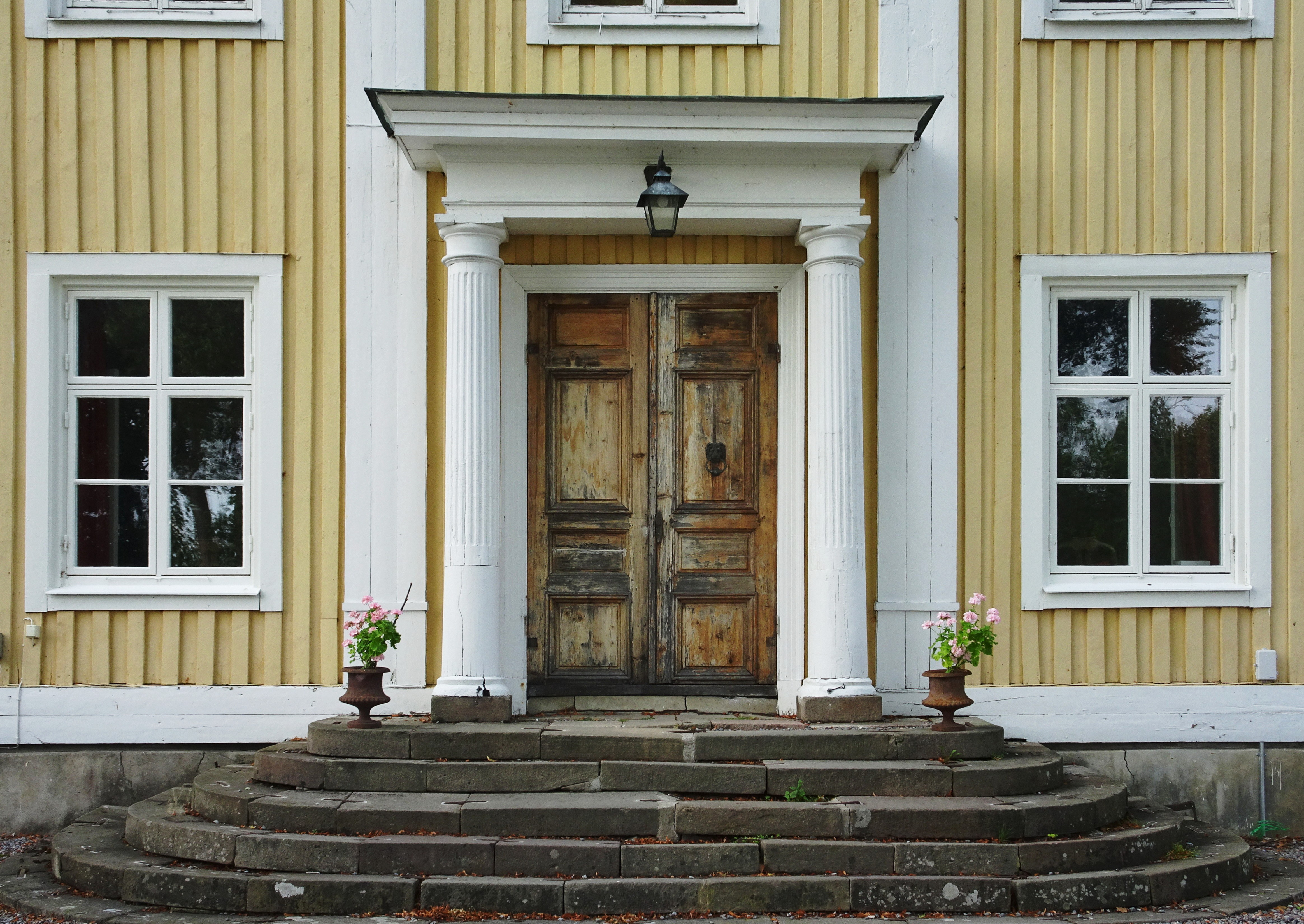 Öråkers gård